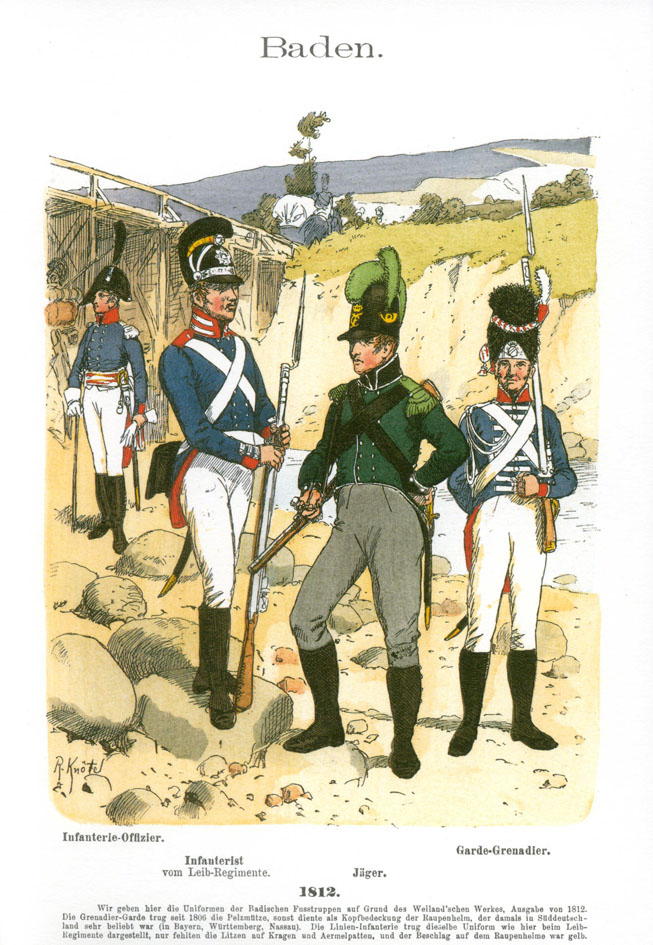 Иллюстрация Рихарда Кнотеля